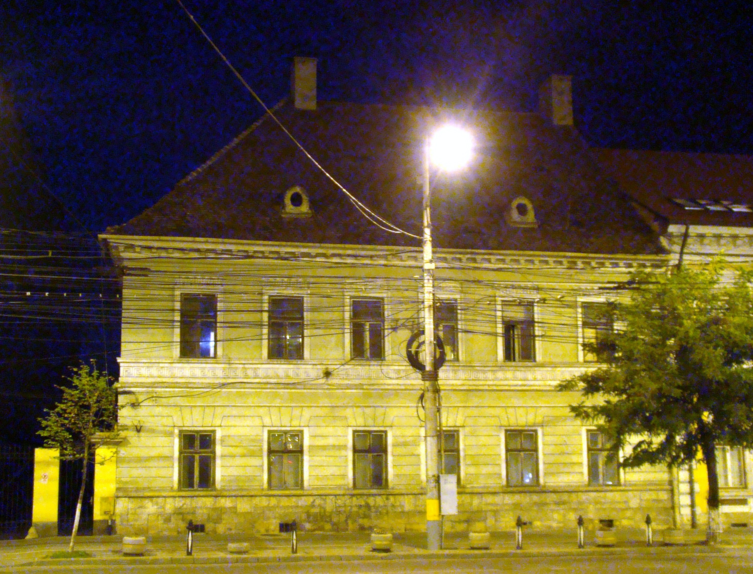 Clădire monument istoric, Piața Iancu Avram 14